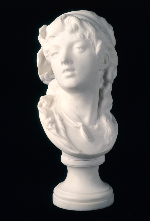 Museo Soumaya, Ciudad de México